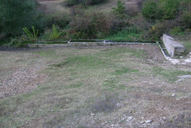 Чешмата при местността Улуклий -- с.Левски, общ. Панагюрище, обл.Пазарджик,България